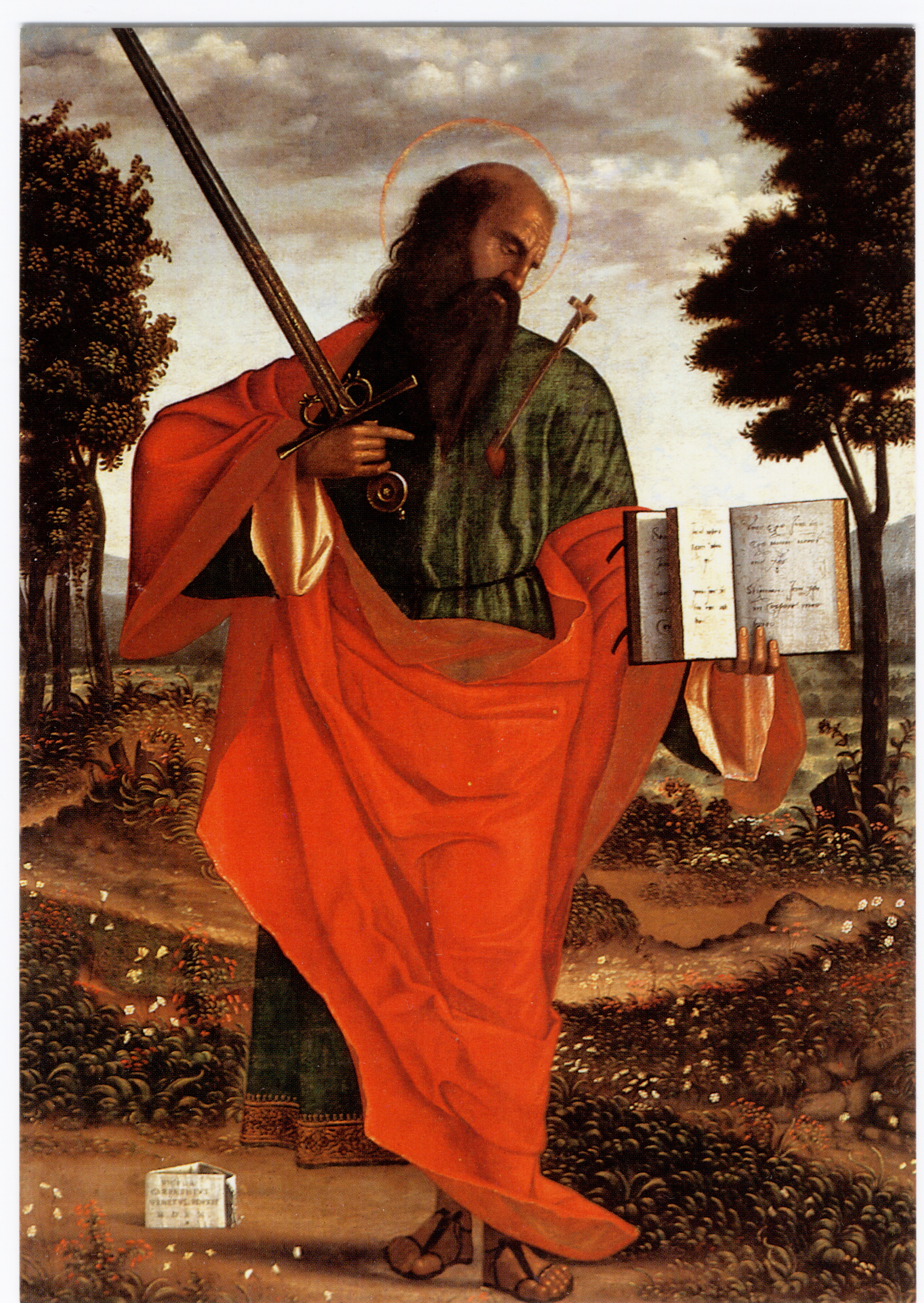 Vittore Carpaccio - San Paolo stigmatizzato - 1520 -Santuario di San Domenico - Chioggia